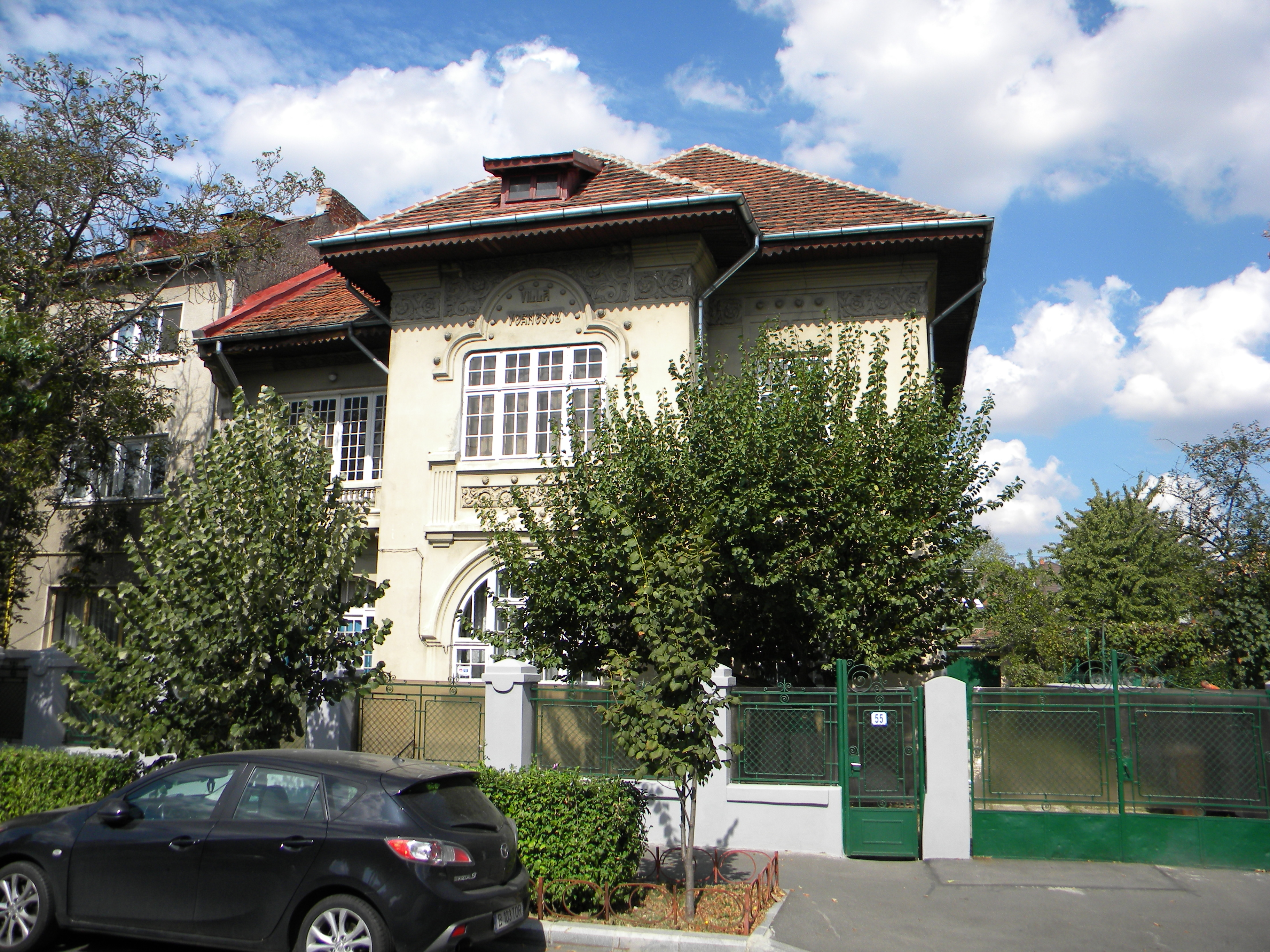 Bucuresti, Romania, Str. Alexandru Constantinescu nr. 55; B-II-m-B-18479 (Vila Vernescu)